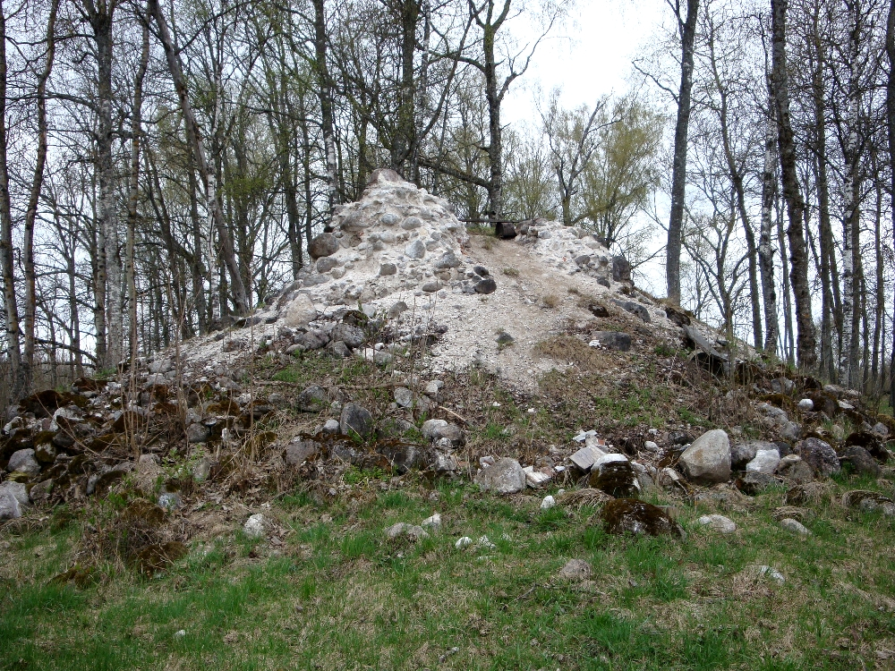 Linnuse territooriumil olev tornivare, ilmselt ümara suurtükitorni oma.